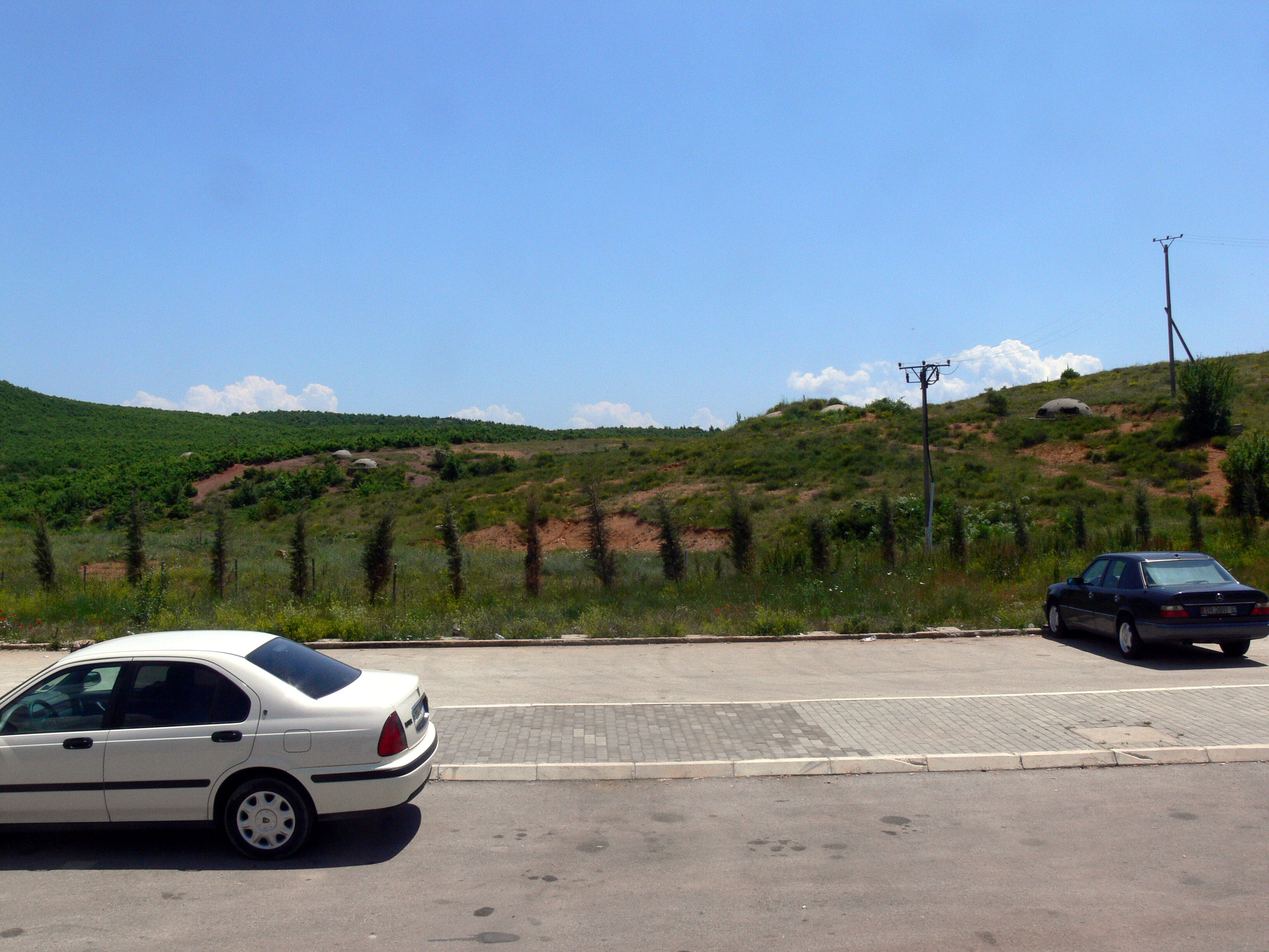 Border between Albania and Makedonia